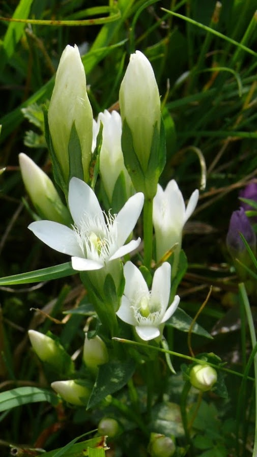 Albinovariante des Böhmischen Enzians (Gentianella praecox bohemica) im österreichischen Böhmerwald/Mühlviertel